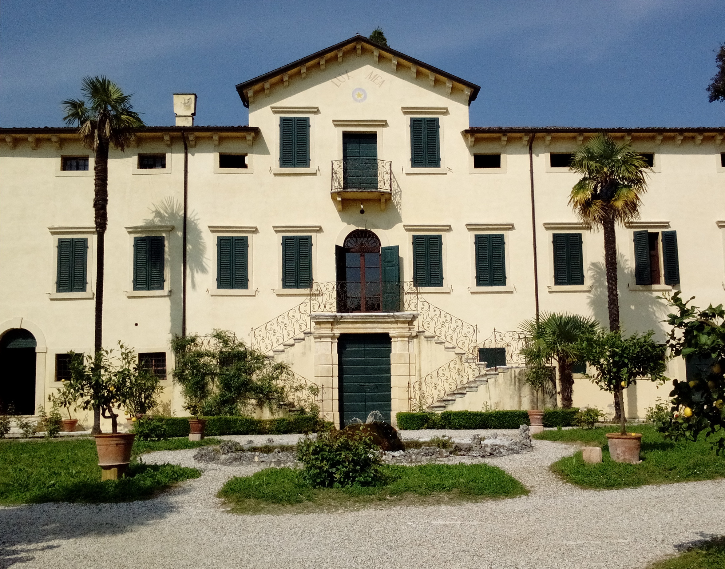 Villa La Sorte (XVIII secolo) a Negrar, provincia di Verona